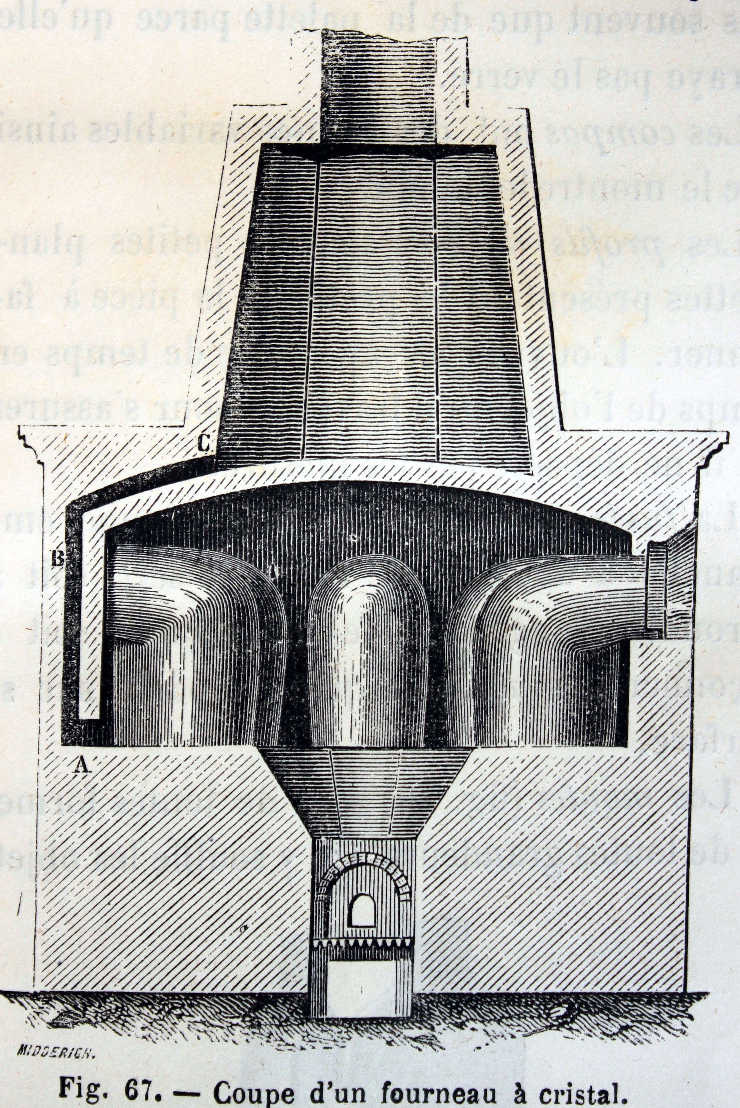 Ilustraciones de la obra : Les merveilles de l'industrie ou, Description des principales industries modernes / par Louis Figuier. - Paris : Furne, Jouvet, [1873-1877]. - Tome I